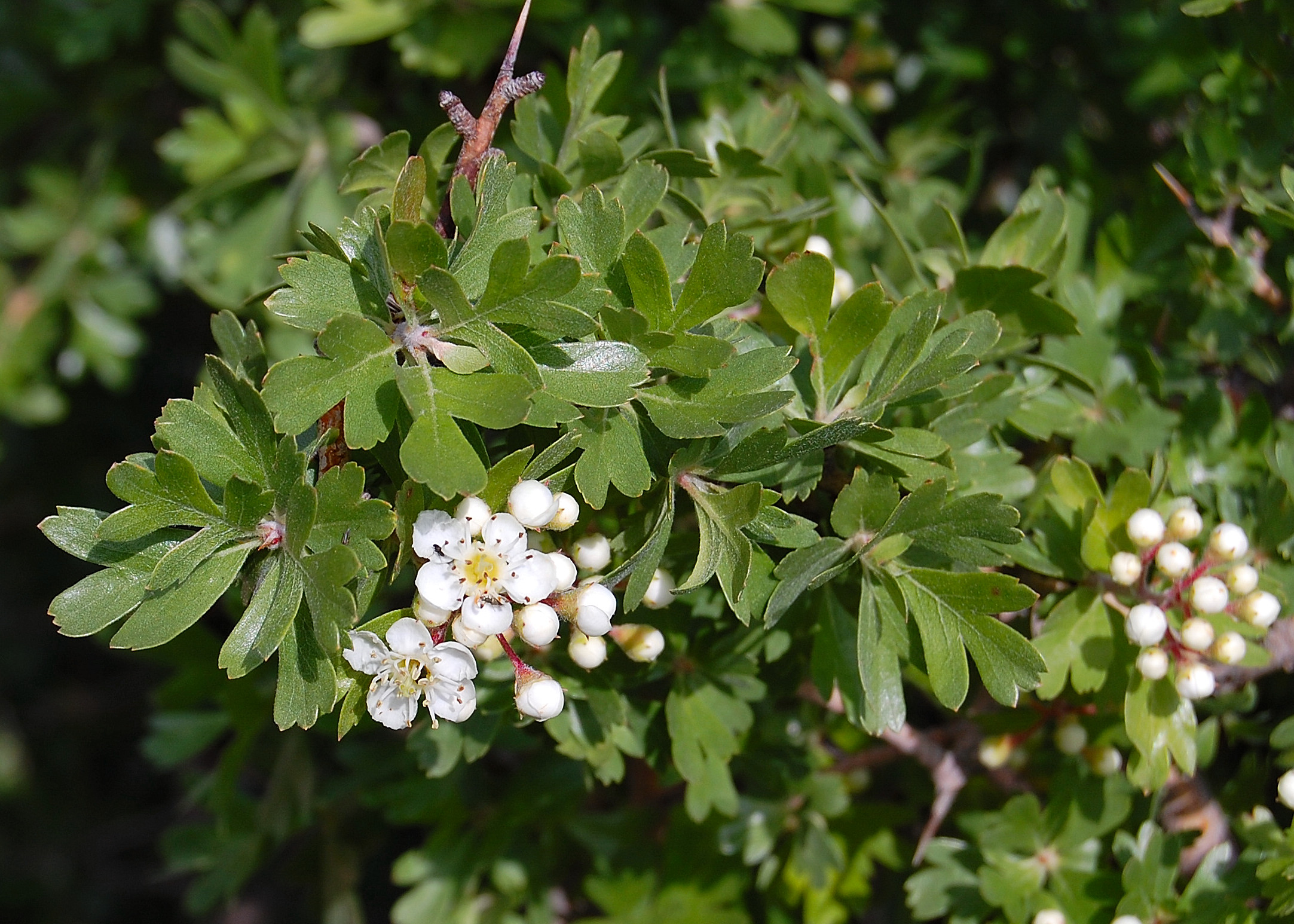 Crataegus azarolus Riserva dello Zingaro